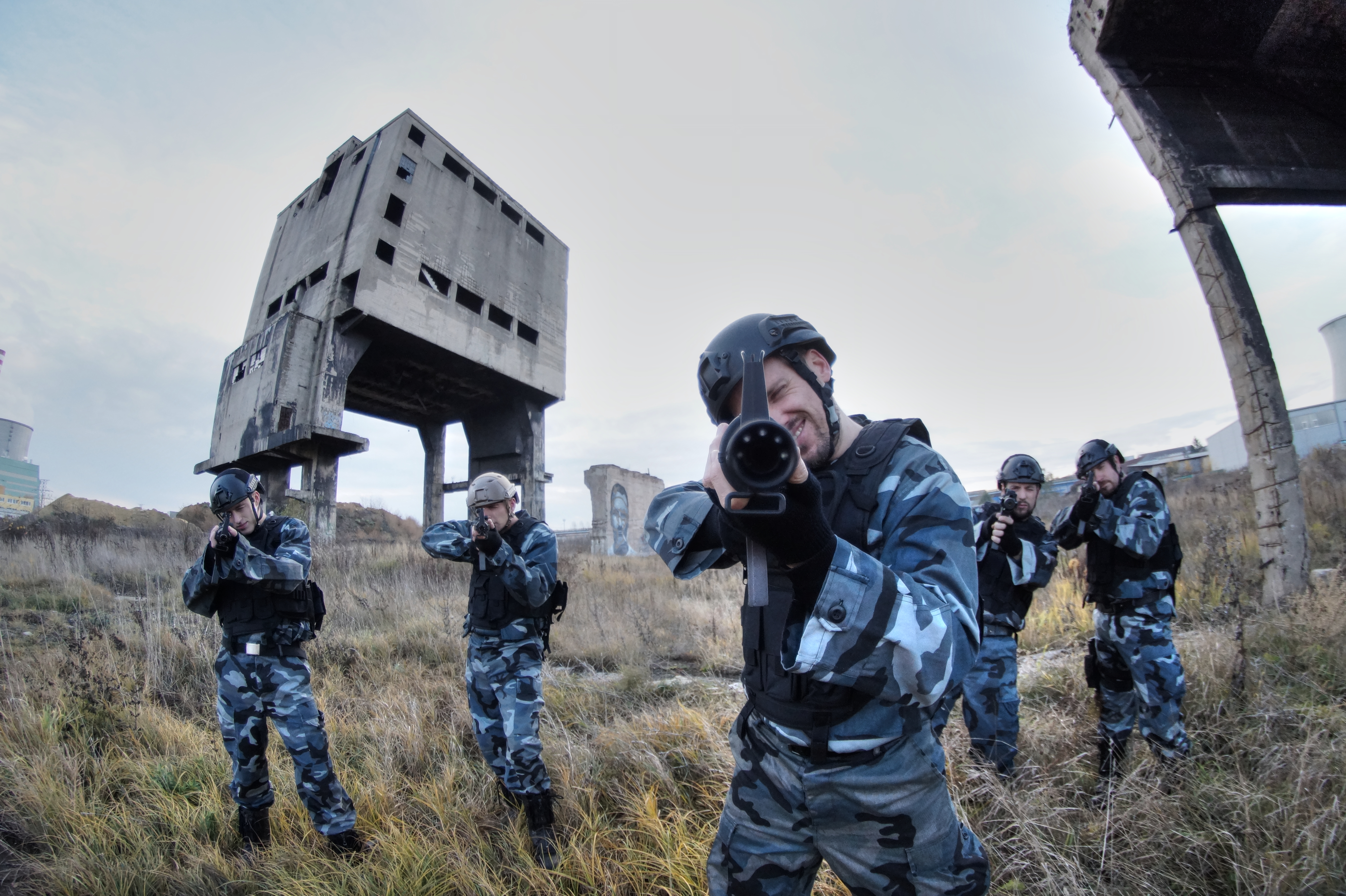 Natáčení videoklipu "Za naše sny" v kladenské Poldovce - listopad 2019.